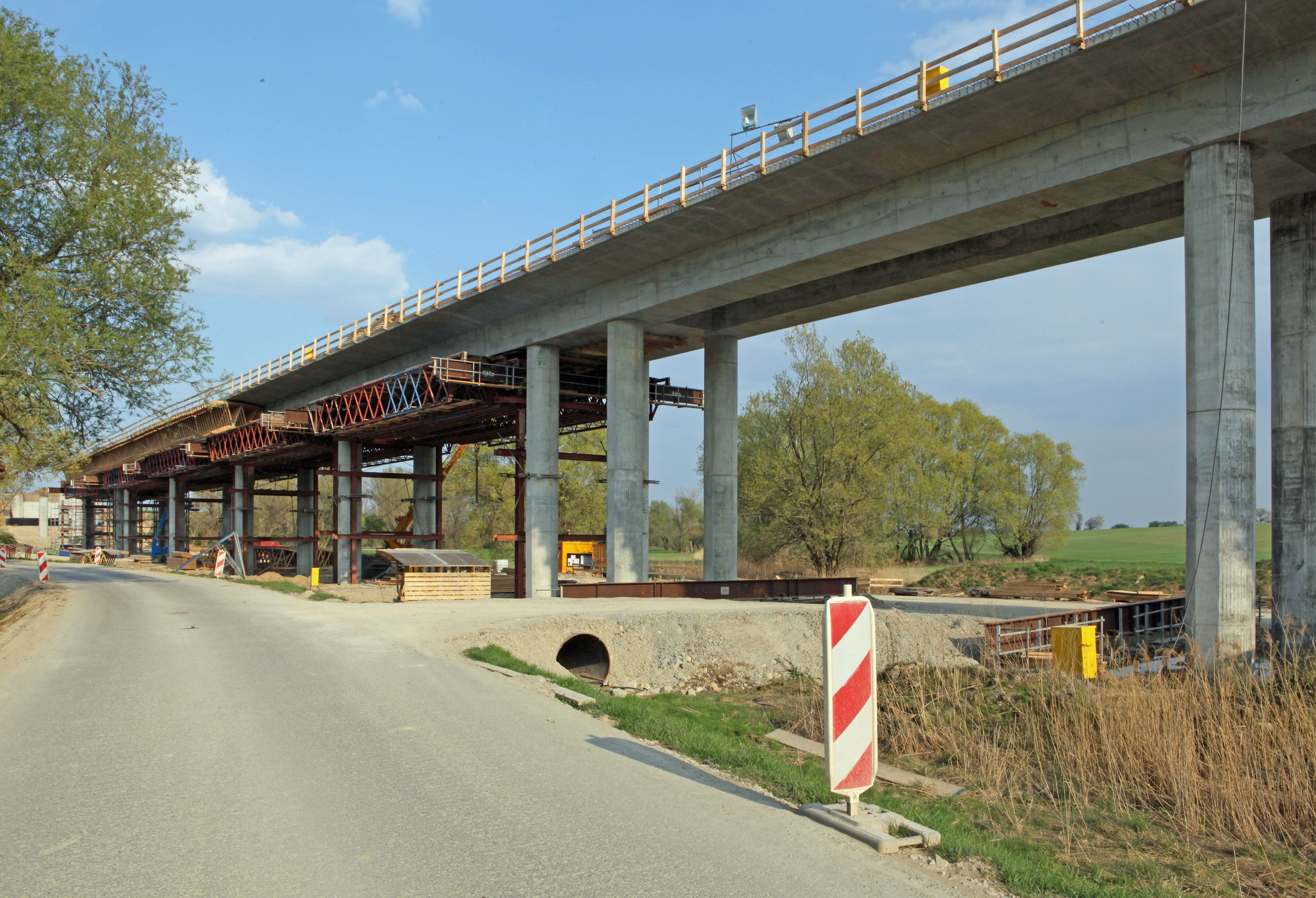 Stöbnitztalbrücke bei Oechlitz im Saalekreis in Sachsen-Anhalt